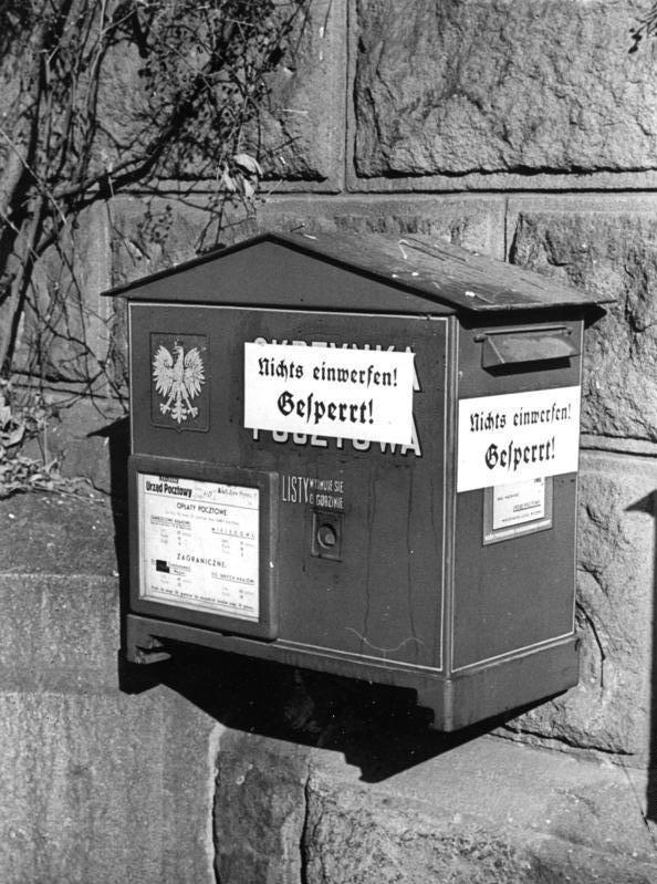 Polen, Gesperrter polnischer Briefkasten Aus Posen. Ehemaliger polnischer Briefkasten. Fot. Ho. 31.10.39 2815-39